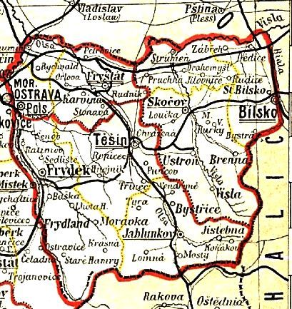 Správní rozdělení Těšínska v roce 1897 (výsek z mapy správního rozdělení Markrabství Moravského a Vévodství Slezského - přílohy Ottova slovníku naučného).